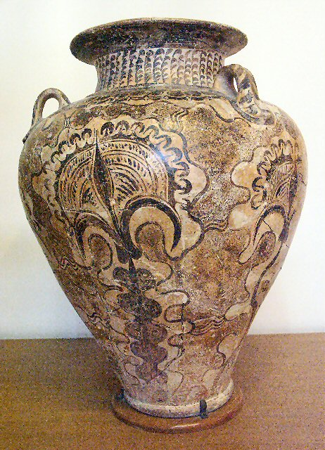 Kanne im Flora-Stil Ort: Archäologisches Museum, Iraklio, Kreta